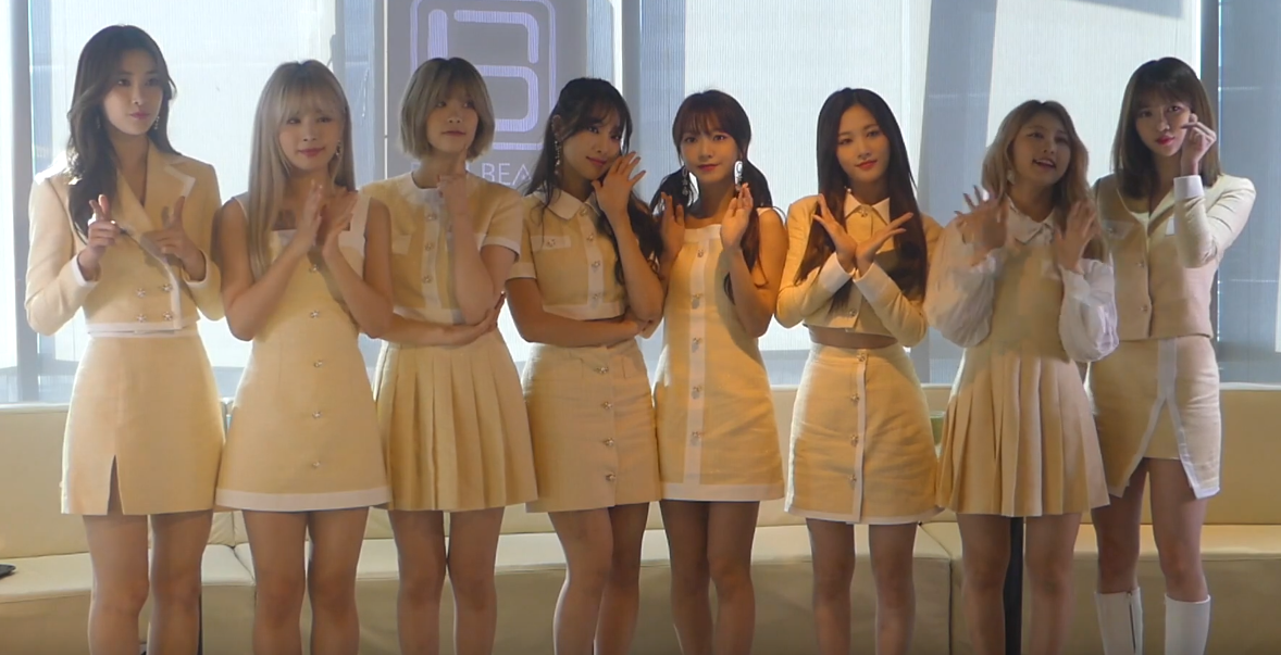 포토타임을 가지고 있는 네이처 멤버들.